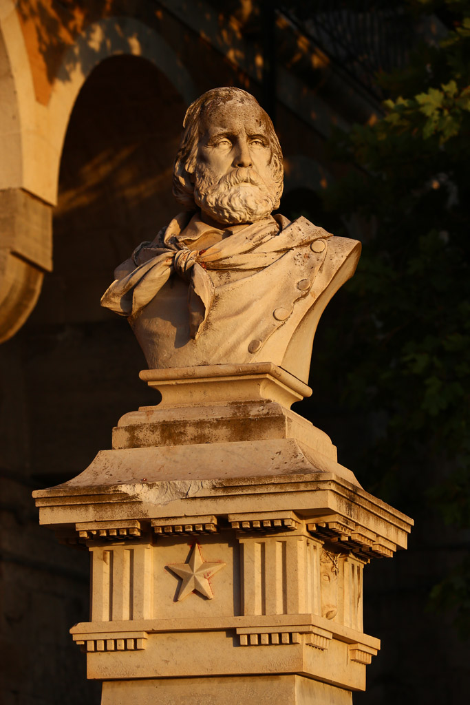 Garibaldi - Foro Italico - Ortigia (Siracusa)